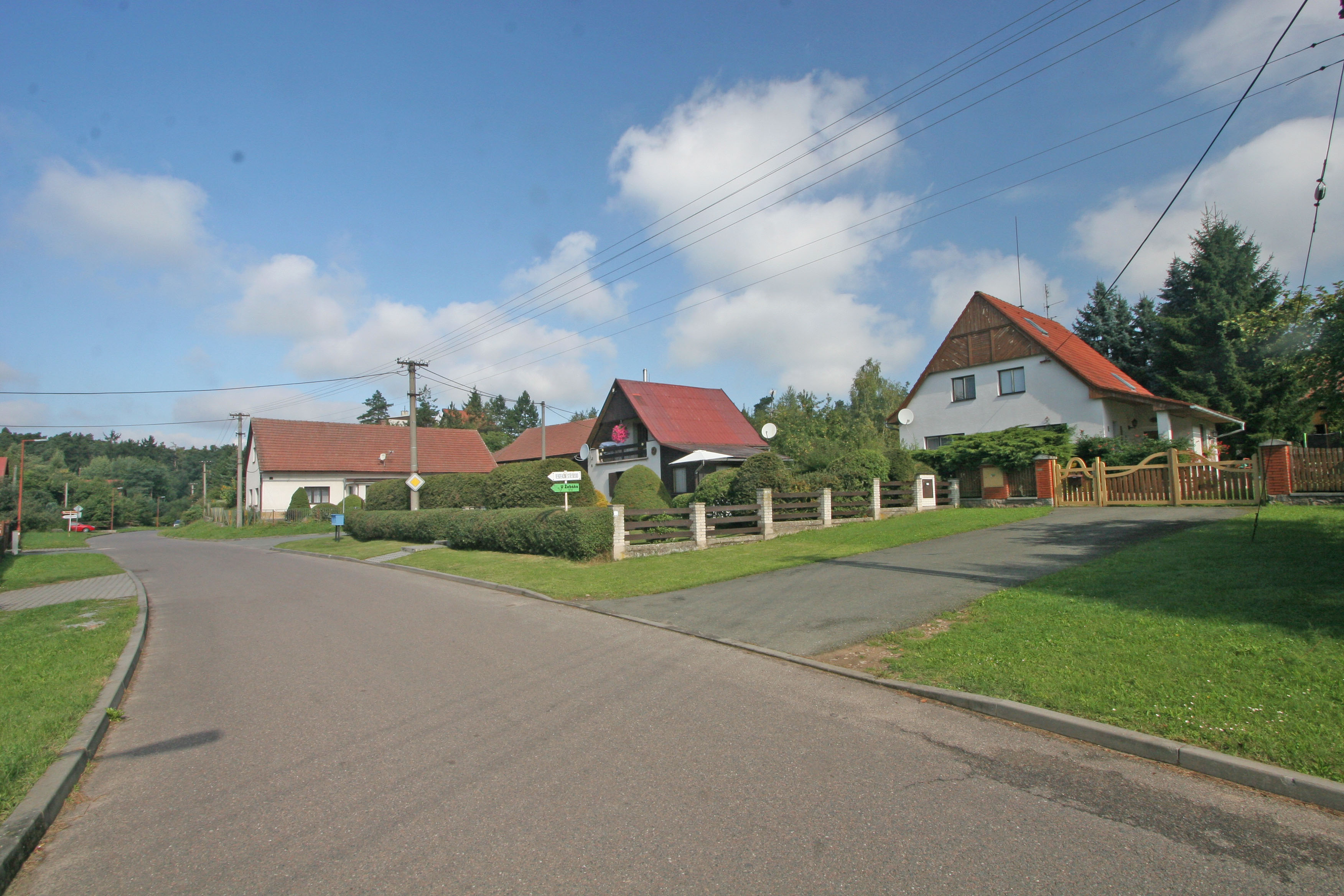 Seník čp. 74